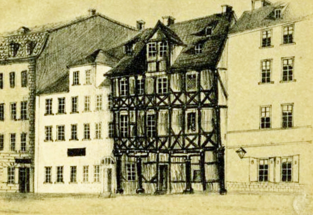 Das alte Begiunenhaus (Mitte) in der Universitätsstraße Leipzig vor seinem Abriss 1855